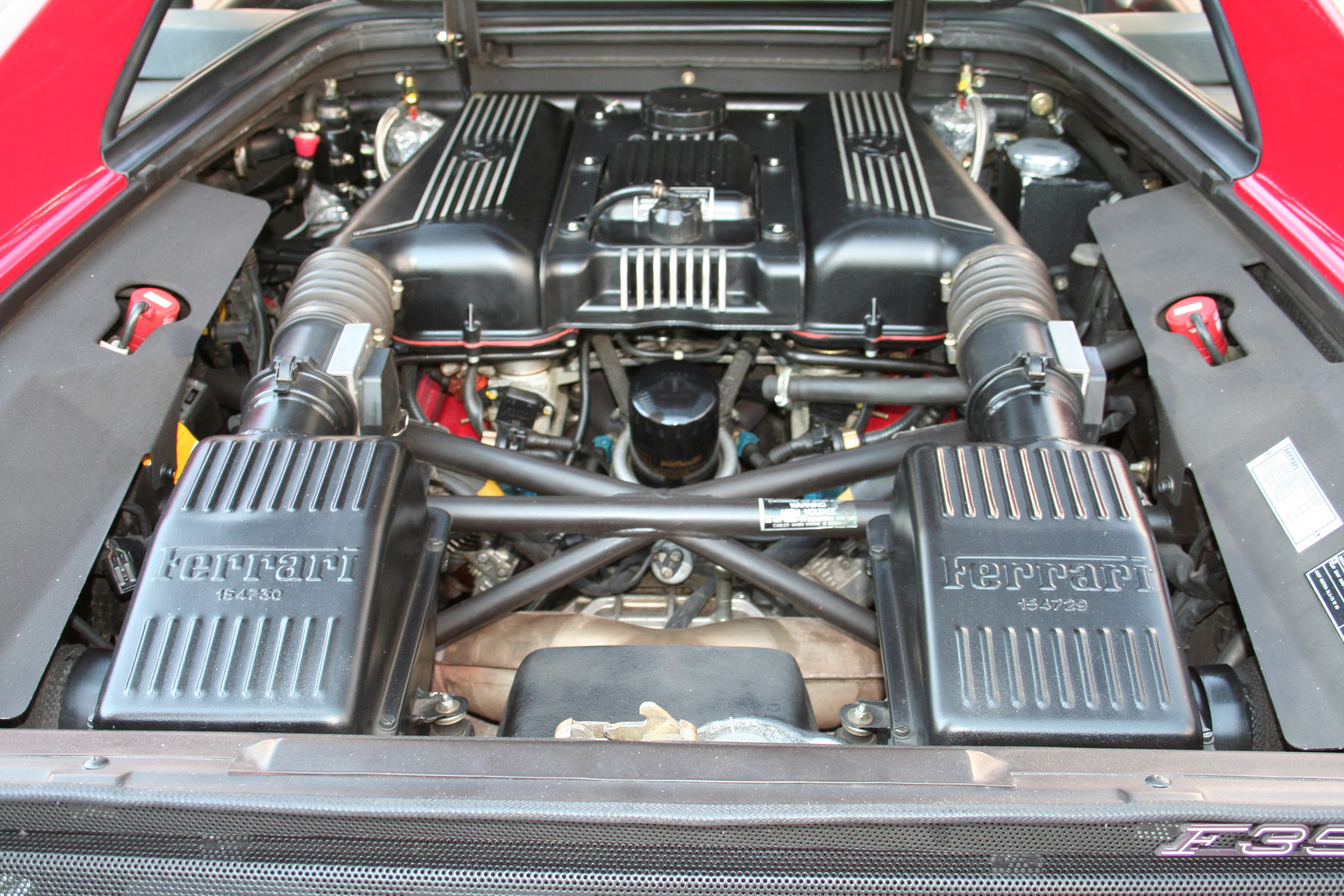 Motor eines Ferrari F355 Spider